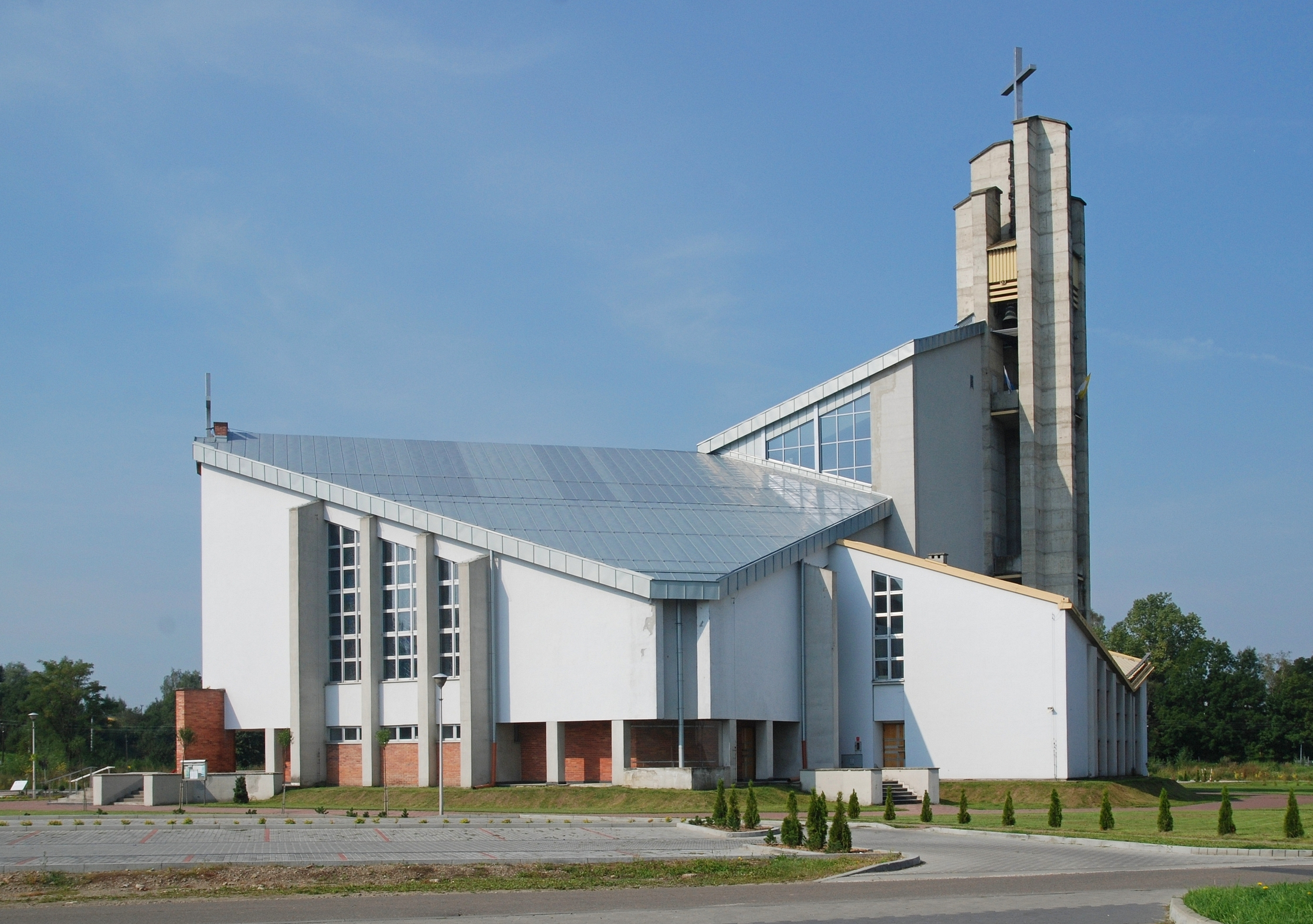 wieś Libusza (województwo małopolskie)